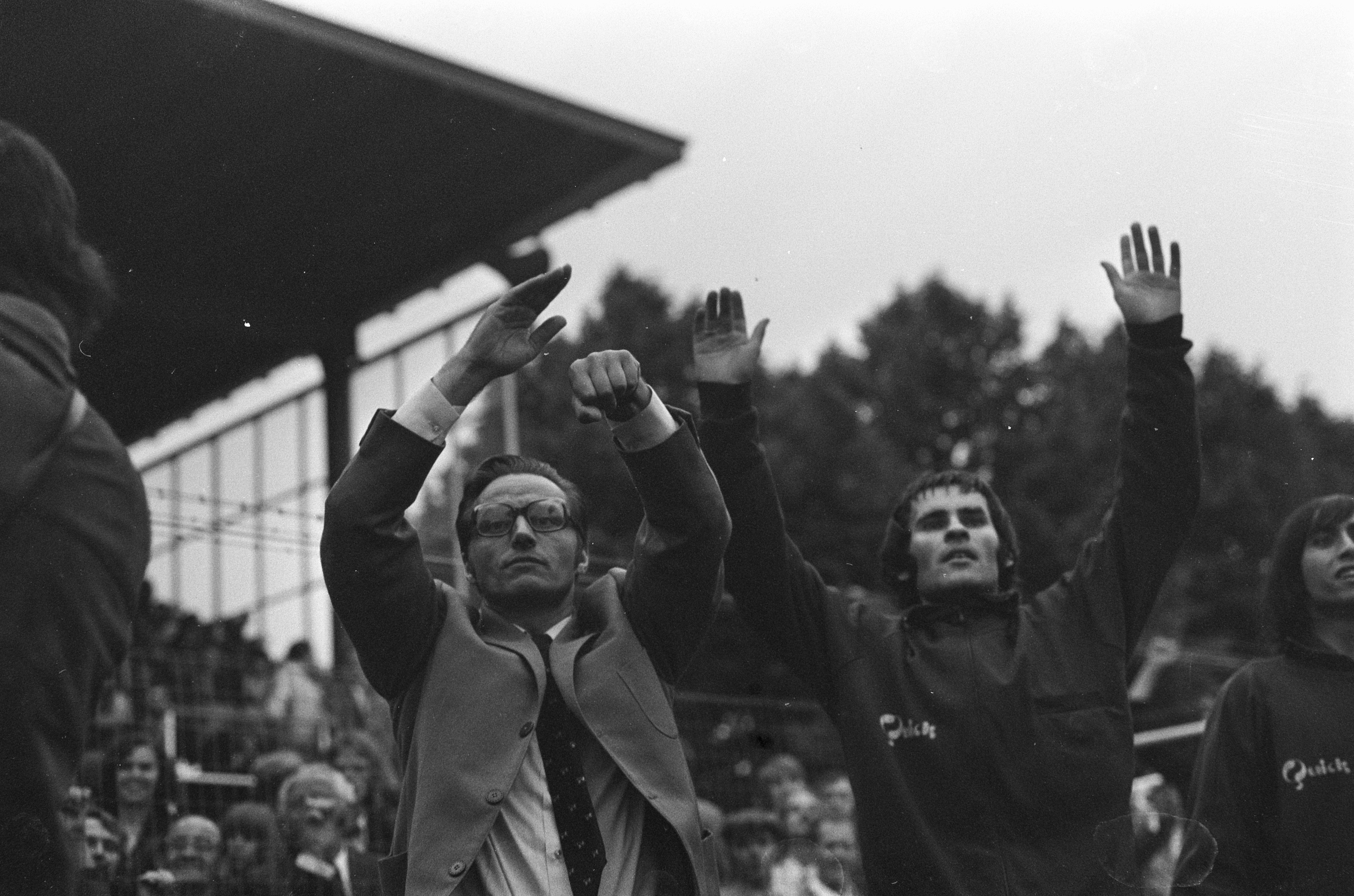 Collectie / Archief : Fotocollectie Anefo Reportage / Serie : [ onbekend ] Beschrijving : De Graafschap gepromoveerd naar eredivisie door met 4-2 te winnen van PEC Zwolle , trainer Piet de Visser naast hem (r) Sietse Veen Datum : 17 juni 1973 Locatie : Doetinhem Trefwoorden : promoties, sport, voetbal Persoonsnaam : Graafschap Instellingsnaam : PEC Zwolle Fotograaf : Mieremet, Rob / Anefo Auteursrechthebbende : Nationaal Archief Materiaalsoort : Negatief (zwart/wit) Nummer archiefinventaris : bekijk toegang 2.24.01.05 Bestanddeelnummer : 926-4889